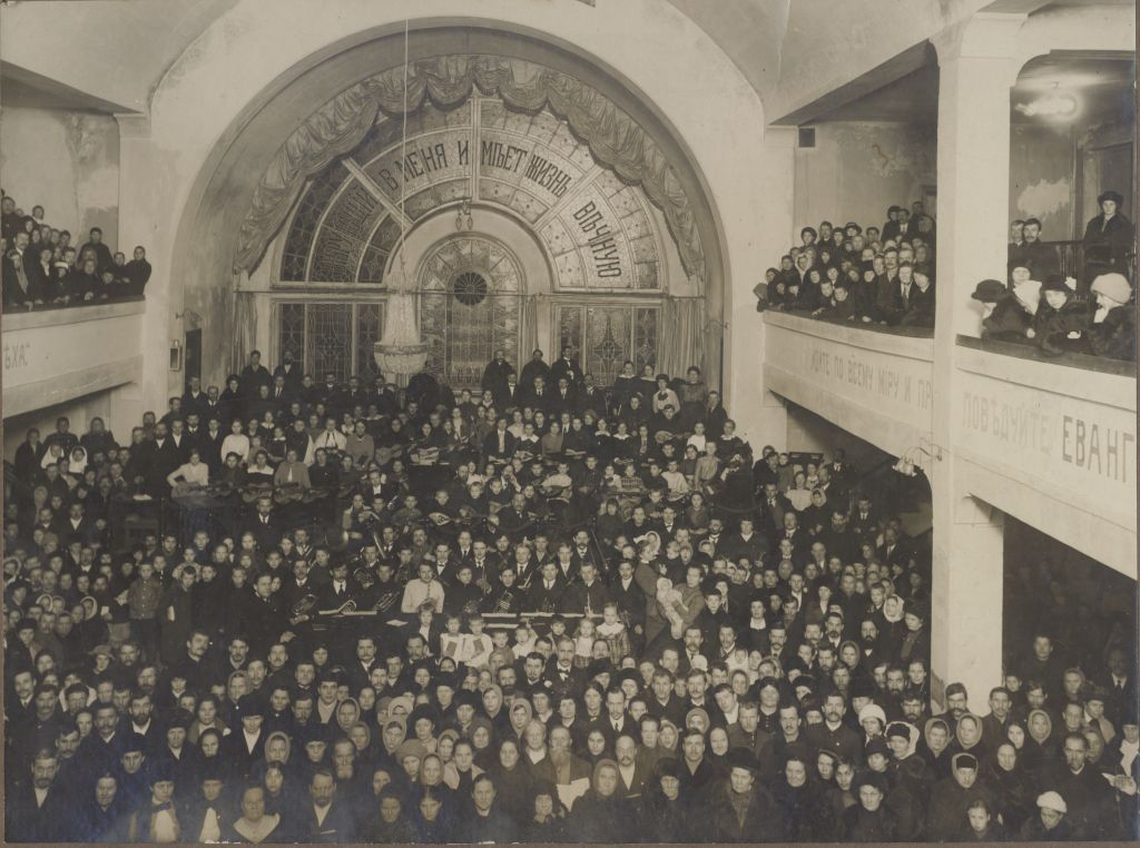 Открытие Дома Евангелия